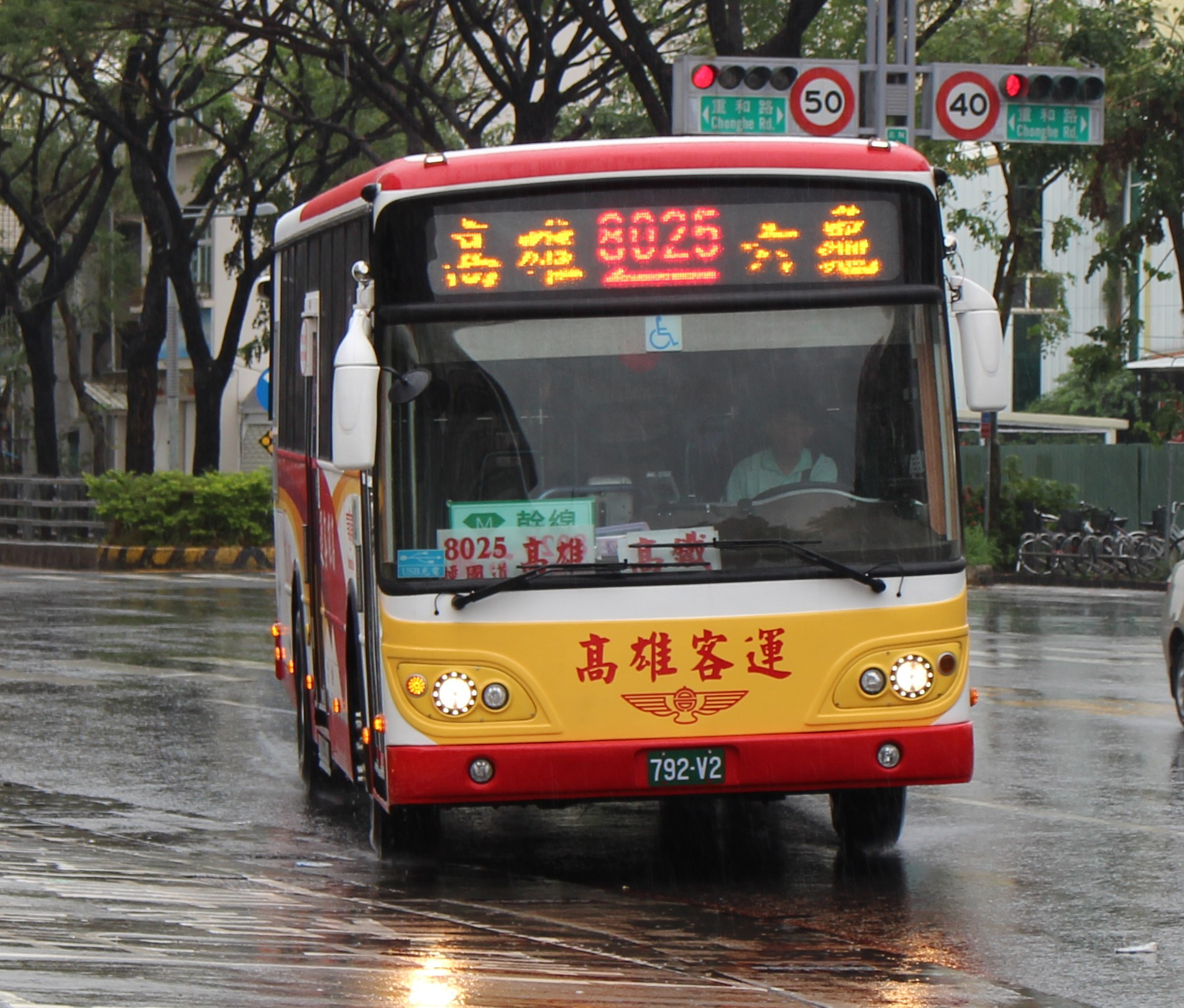 高雄客運2016年大宇BC211MA無障礙復康公車792-V2。